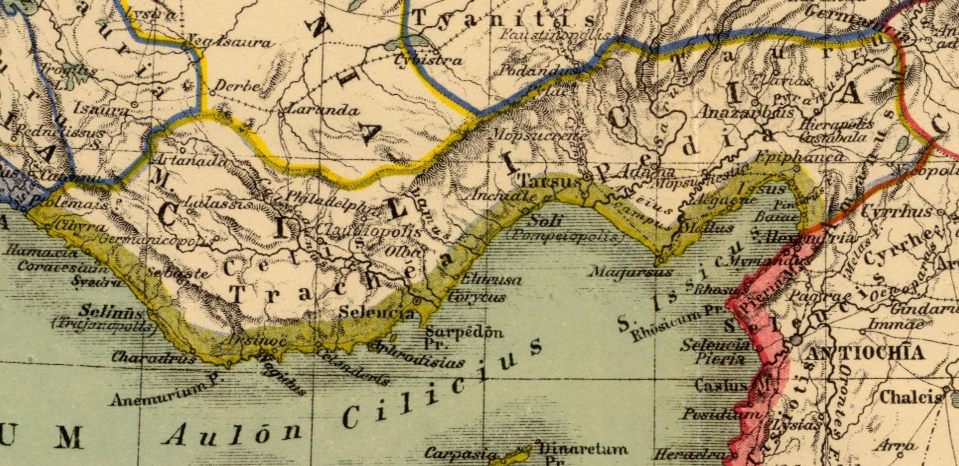 Cilicia. Asia citerior. Auctore Henrico Kiepert Berolinensi. Geographische Verlagshandlung Dietrich Reimer (Ernst Vohsen) Berlin, Wilhemlstr. 29. (1903)